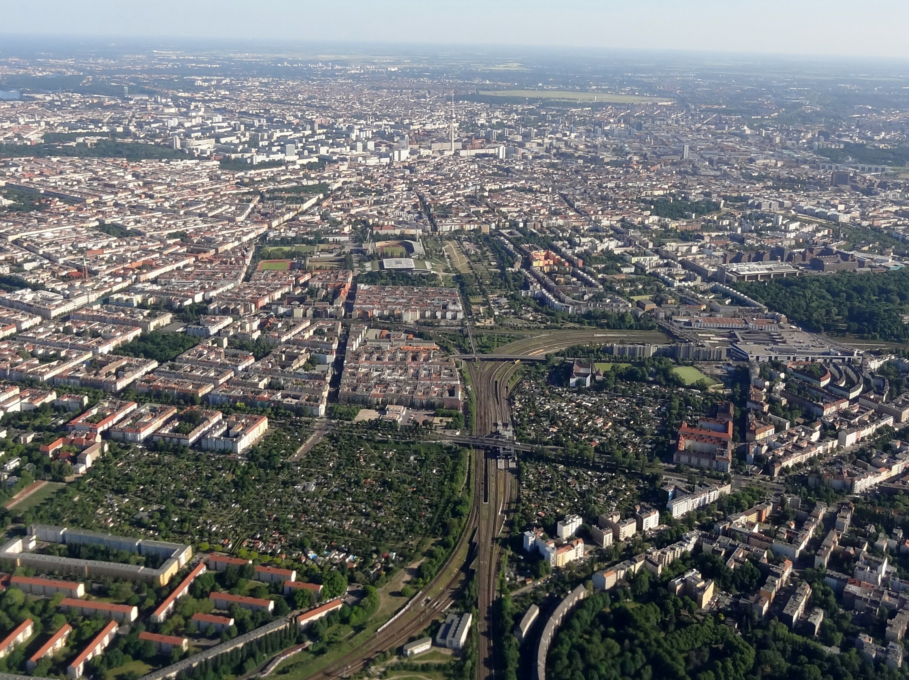 Blick auf die Bahnanlagen am Bahnhof Berlin-Bornholmer Straße, Berlin, Deutschland